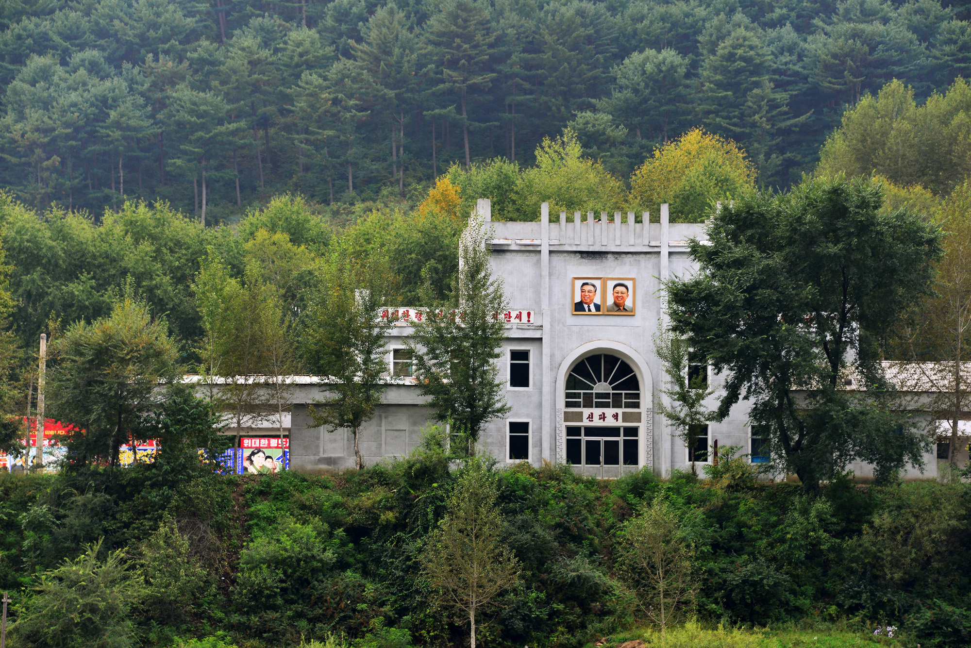 两江道新坡青年站